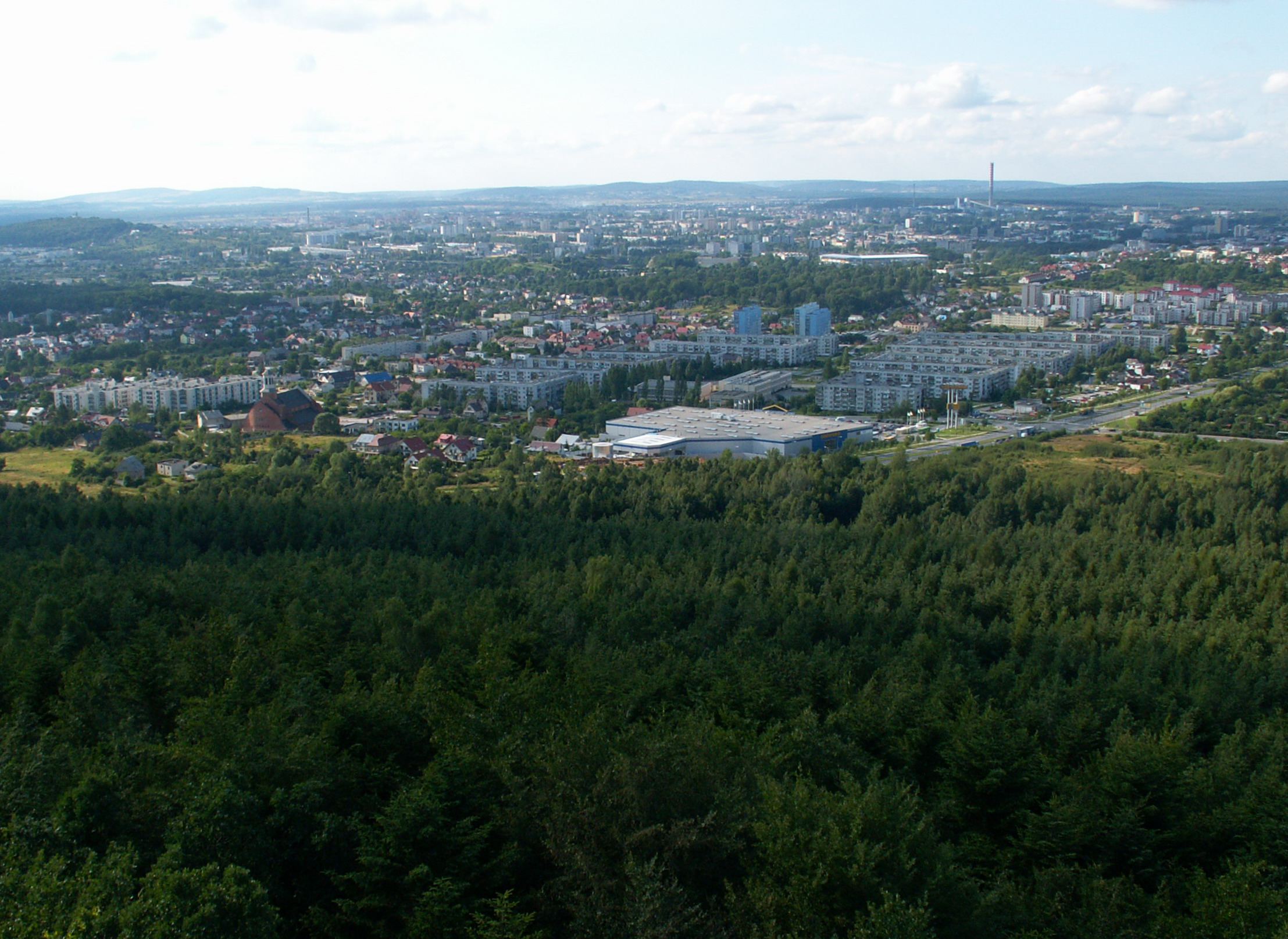 Barwinek quarter in Kielce (Poland)